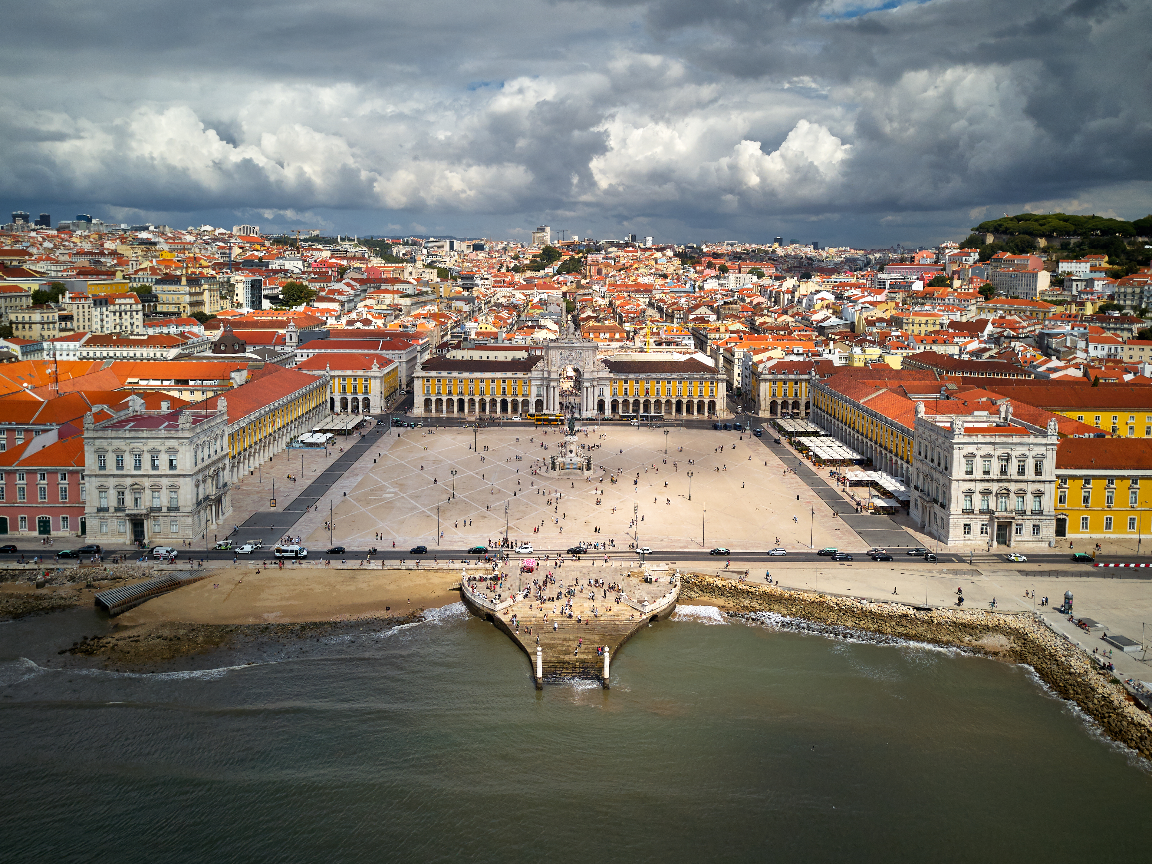 Lisbon main square